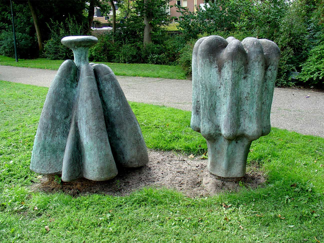 Vita door Louise Schouwenberg - Houtmansplantsoen Gouda